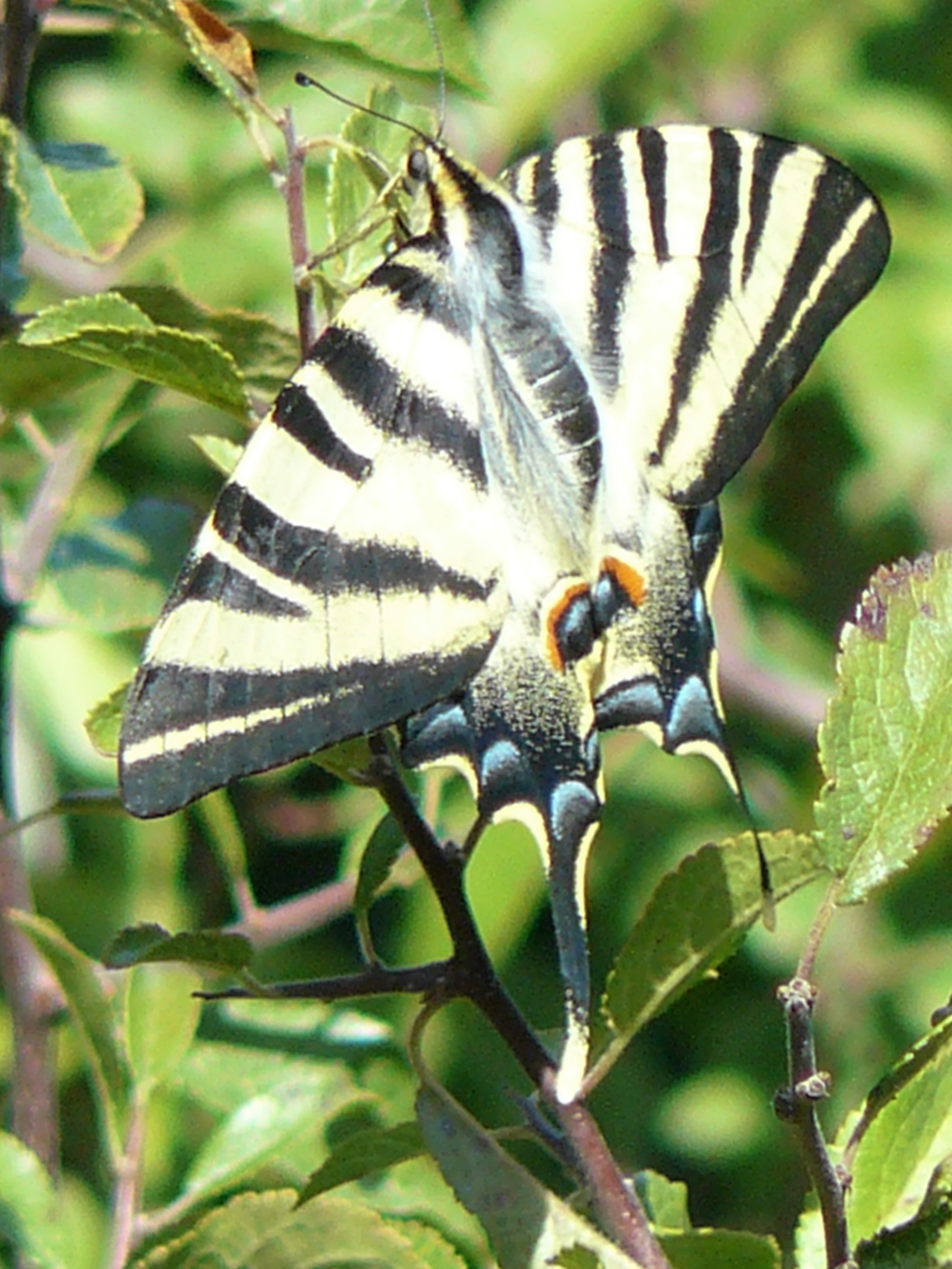 Islas Cíes This is a photography of a Special Area of Conservation in Spain with the ID: ES0000001. Natura2000 entry, EEA entry